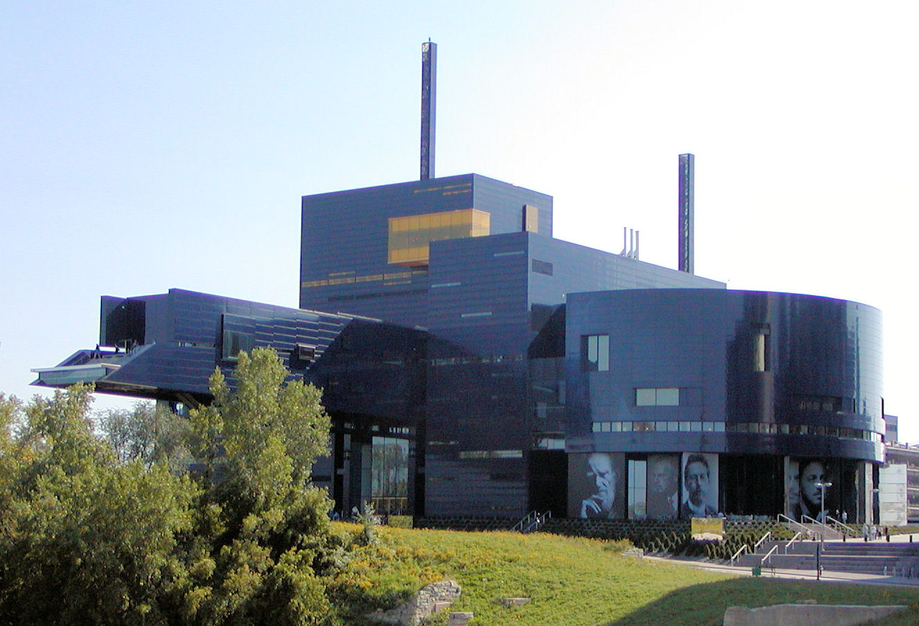 taken by William Wesen 9/13/06